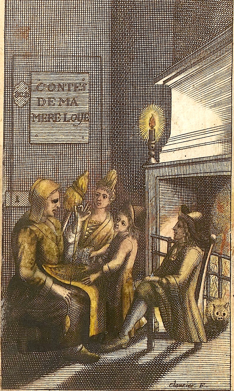 Frontispice of 1697 edition of Charles Perrault: Histoires ou contes du temps passés, avec des moralités – Contes de ma mère l'Oye (Mother Goose tales)